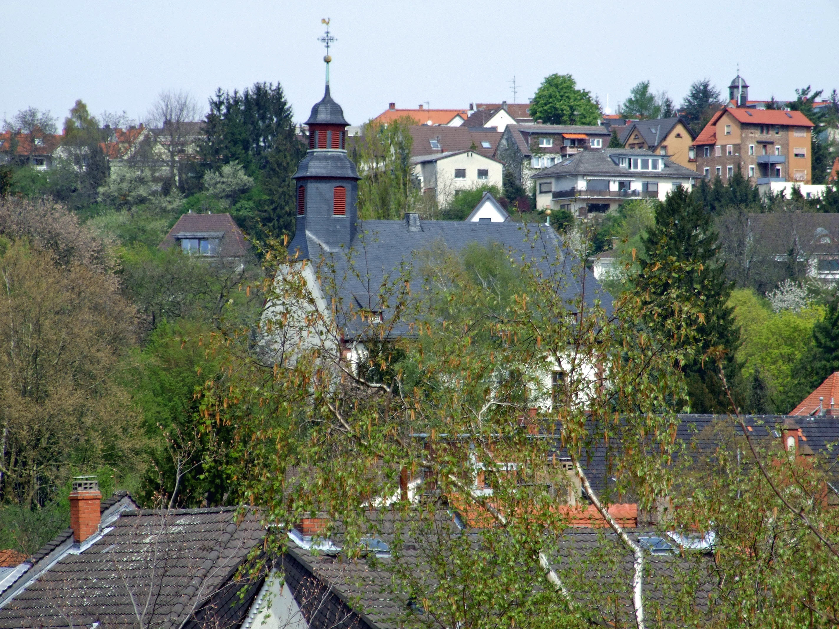 Laurentiuskirche auf dem Enkeimer Friedhof, evangelische Kirche von Enkheim